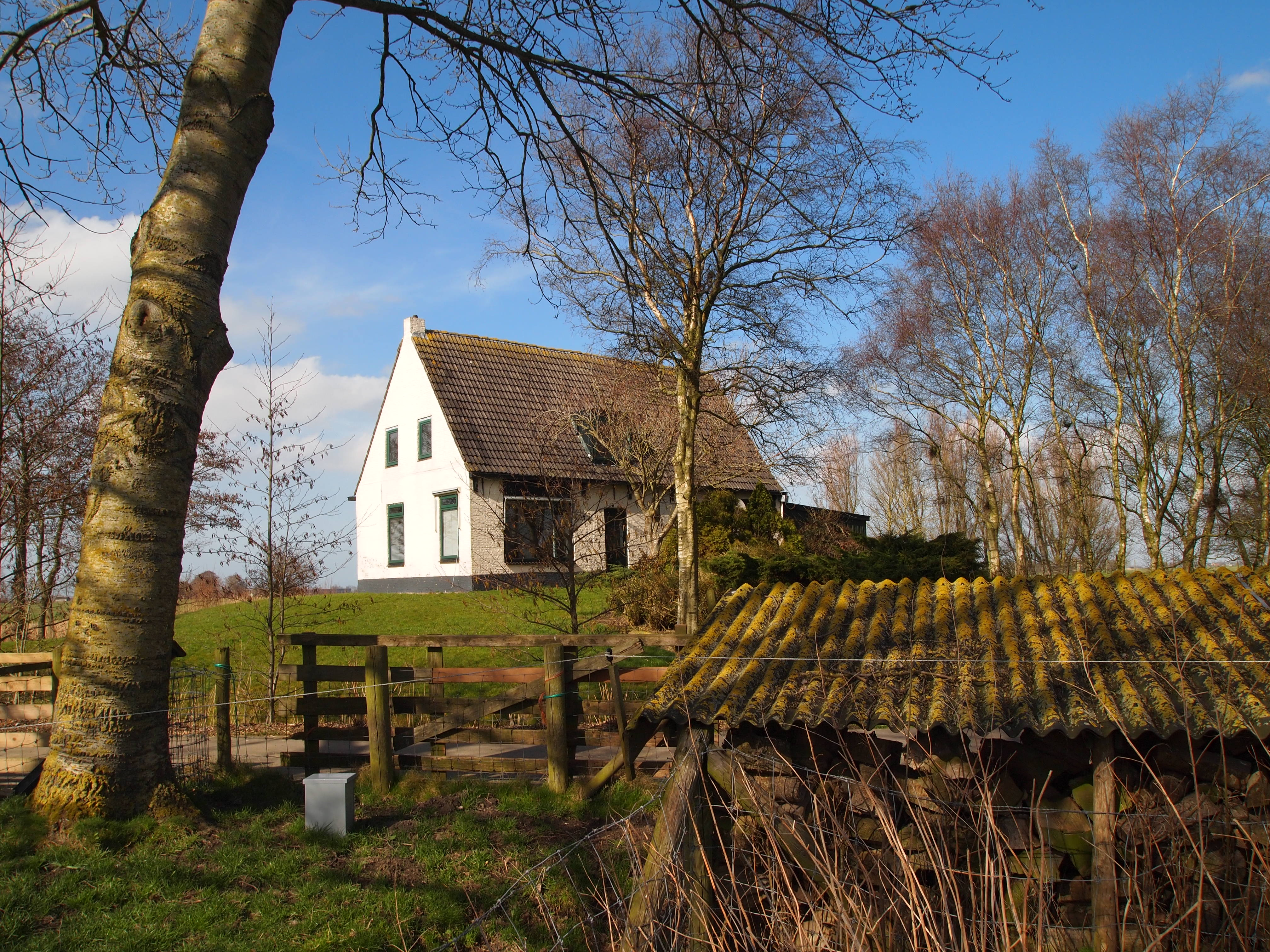 Woning naast het kerkje.